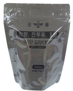 전투식량 2형